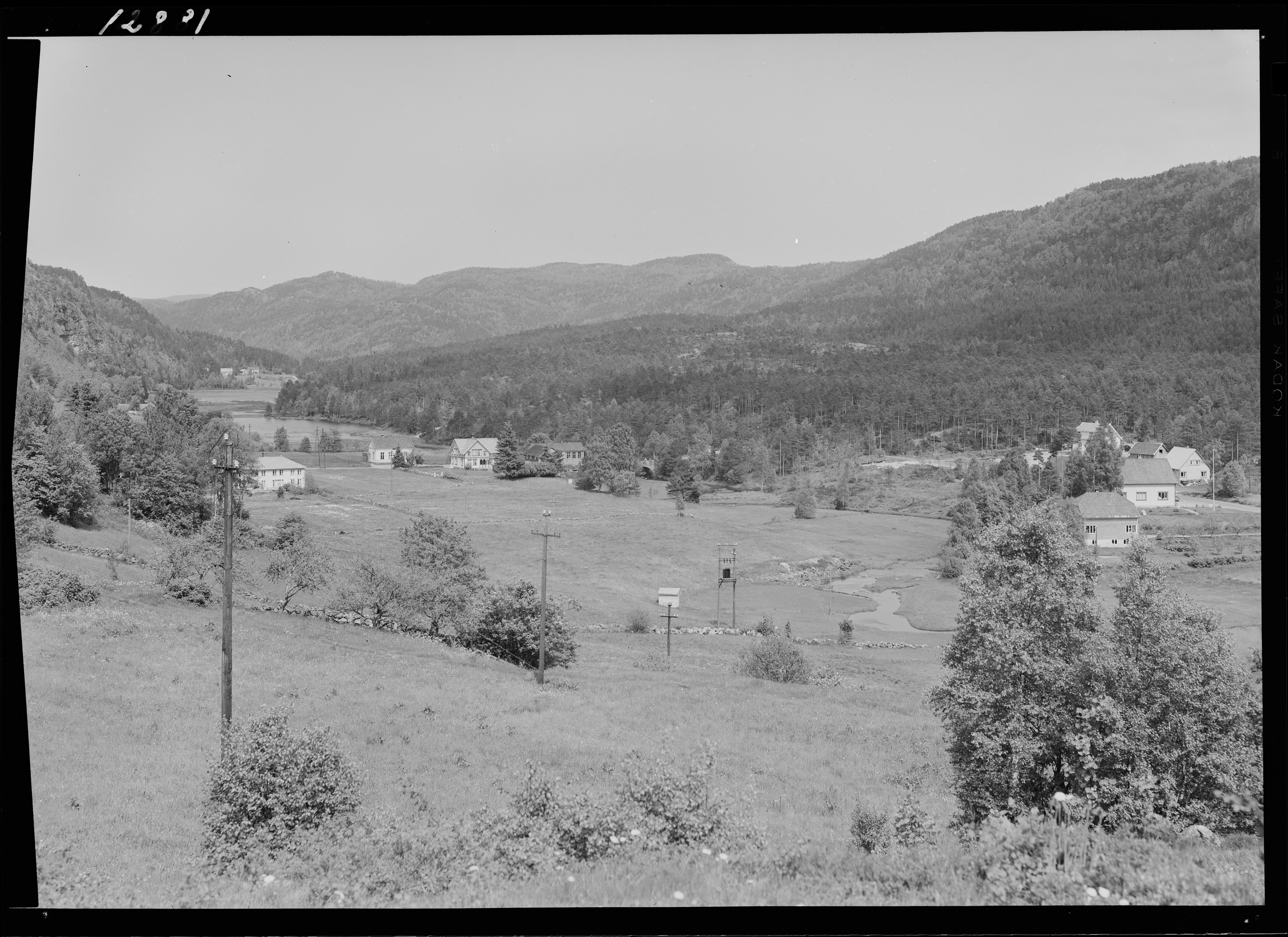 Bildet er hentet fra Nasjonalbibliotekets bildesamling. Anmerkninger til bildet var: Fotograf : L.S. Byremo, Audnedal, Vest Agder